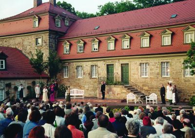 Kissinger Theatertage in der Oberen Saline andere Versionen: nicht vorhanden